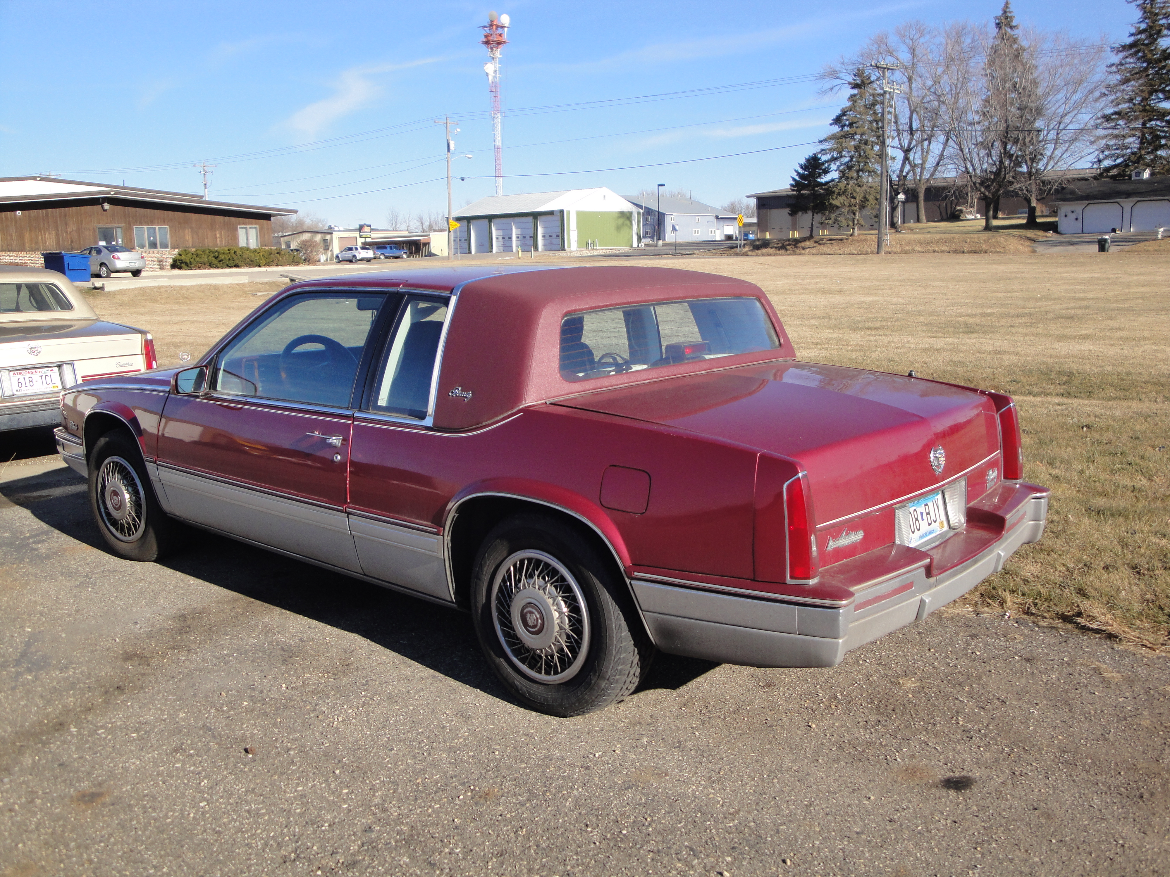 89 Cadillac Eldorado Biarritz & Cadillac Coupe de Ville Year ?